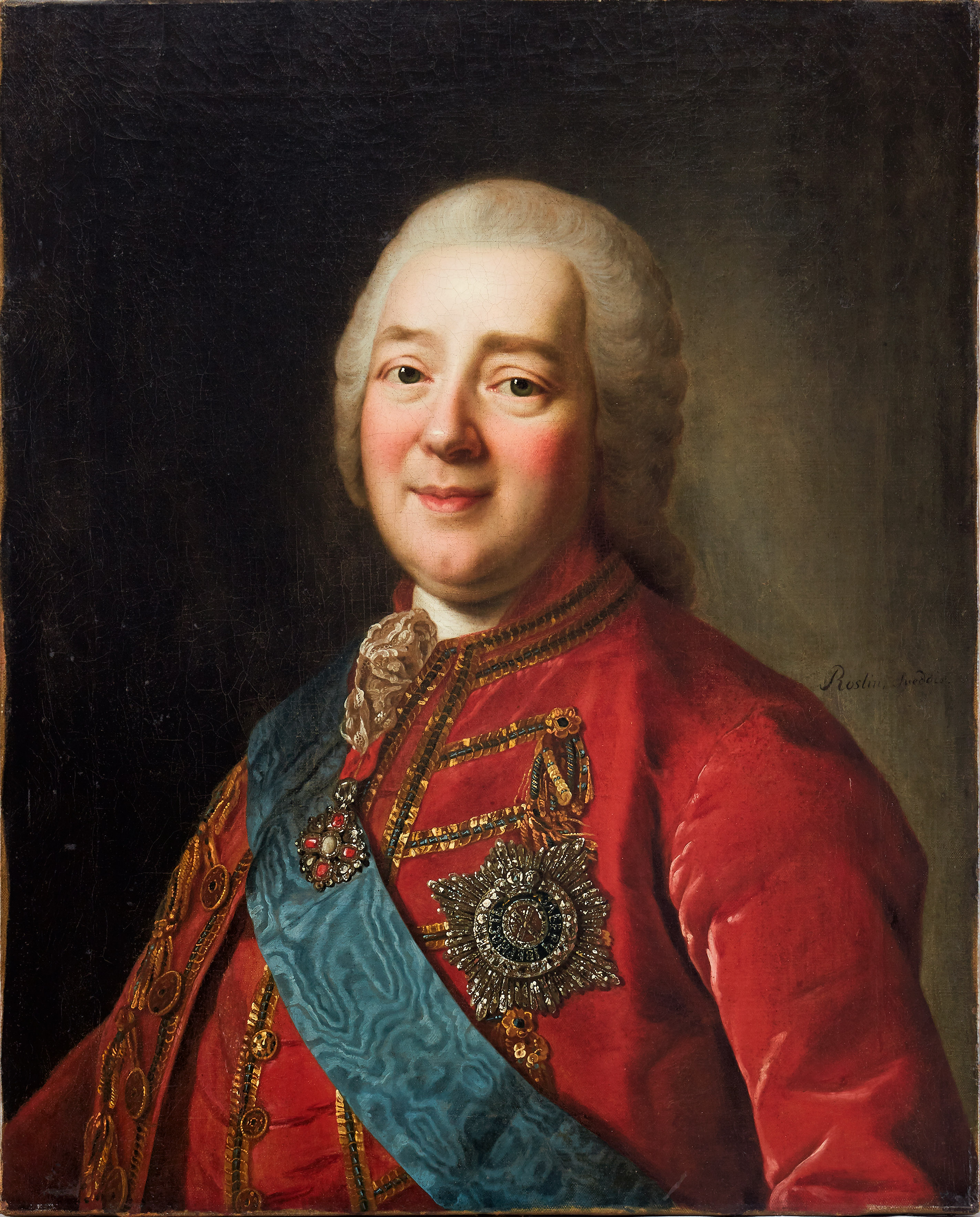 Porträttet föreställer den ryske greven Nikita Ivanovitj Panin (1718‑1783). Han var politiker och diplomat och under åren 1748-1759 ryskt sändebud i Stockholm. Signerad Roslin Suédois. Olja på duk, 72 x 57,5 cm. Målning av Alexander Roslin (1718-1793). Jämför med Roslins porträtt i större format föreställande Greve Panin sittande vid ett skrivbord daterat 1777, i samlingarna vid Pusjkinmuseet, Moskva. Med etikett skriven på ryska, översättningen lyder: ”Avdelningen för ärenden rörande museer och förvaltande av konst- och forntidsminnesmärken vid Folkkommissariatet för utbildning. konstnär Roslen Aleks. titel Portr. av greve Panin N.I. ägare V.A. Charitonenko enskilt nr invent. nr 439” Proveniens: Vera Andrejevna Charitonenko (1859‑1923), därefter i svensk privatsamling.